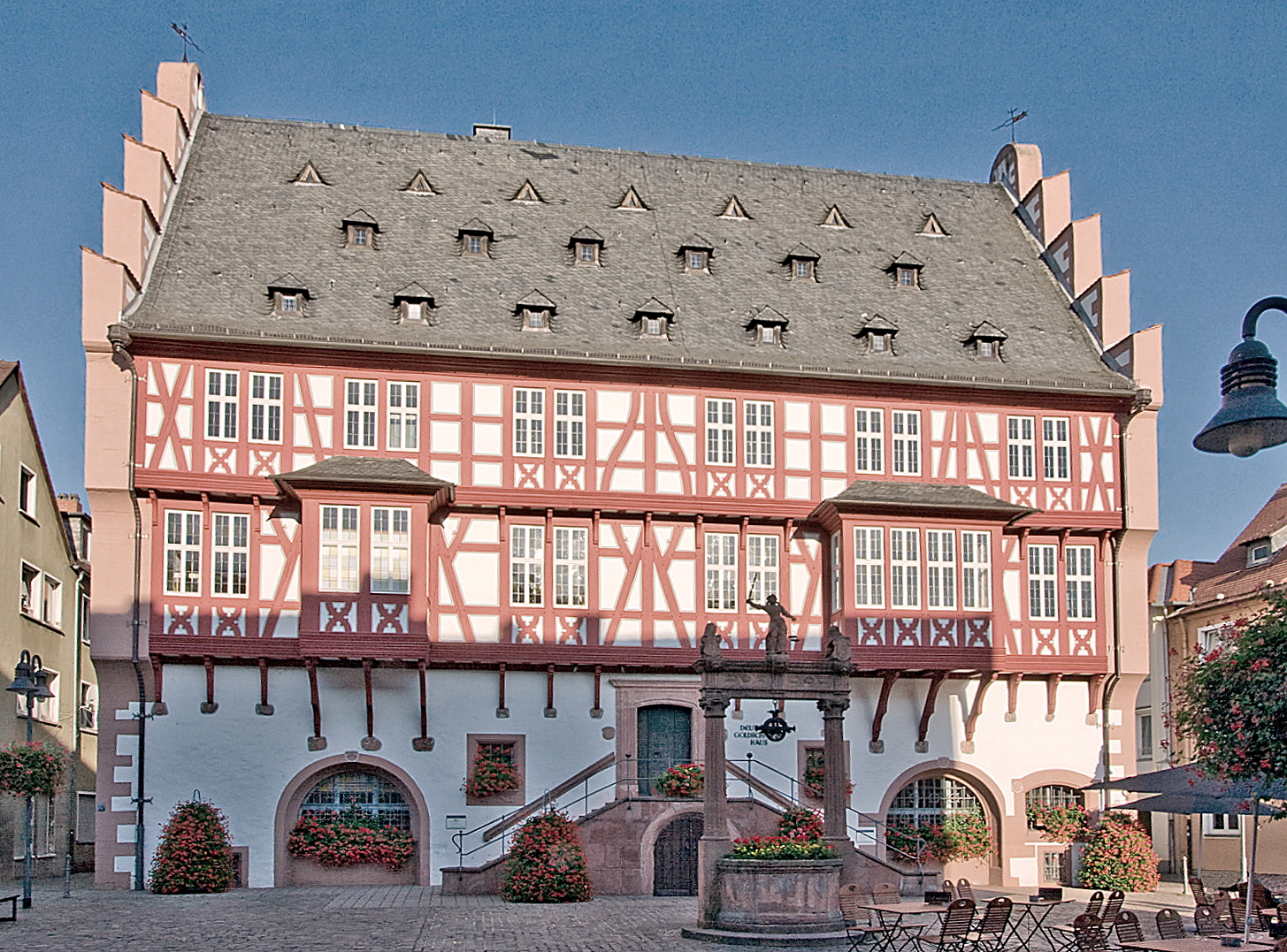 Das Deutsche Goldschmiedehaus in Hanau. Das Gebäude wurde als Fachwerkbau an der Längsseite des Altstädter Marktes zwischen zwei steinernen Giebelwänden und auf einem steinernen Sockelgeschoss errichtet. Es entstammt der Spätgotik und Frührenaissance und wird durch eine Bauinschrift auf das Jahr 1538 datiert.